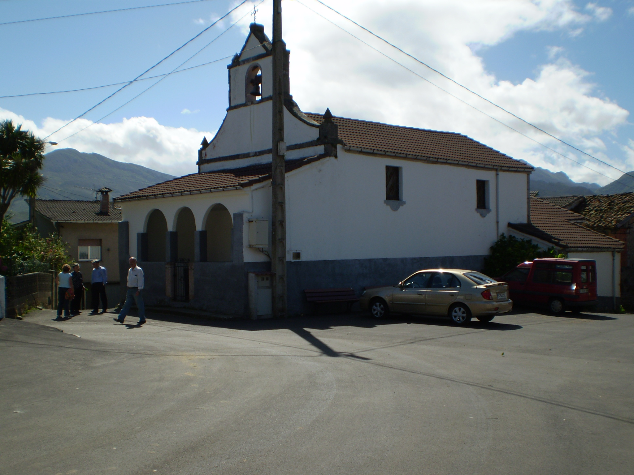 La ilesia de Castañeo'l Monte (Santu Adrianu, Asturies) vista dende la plaza.